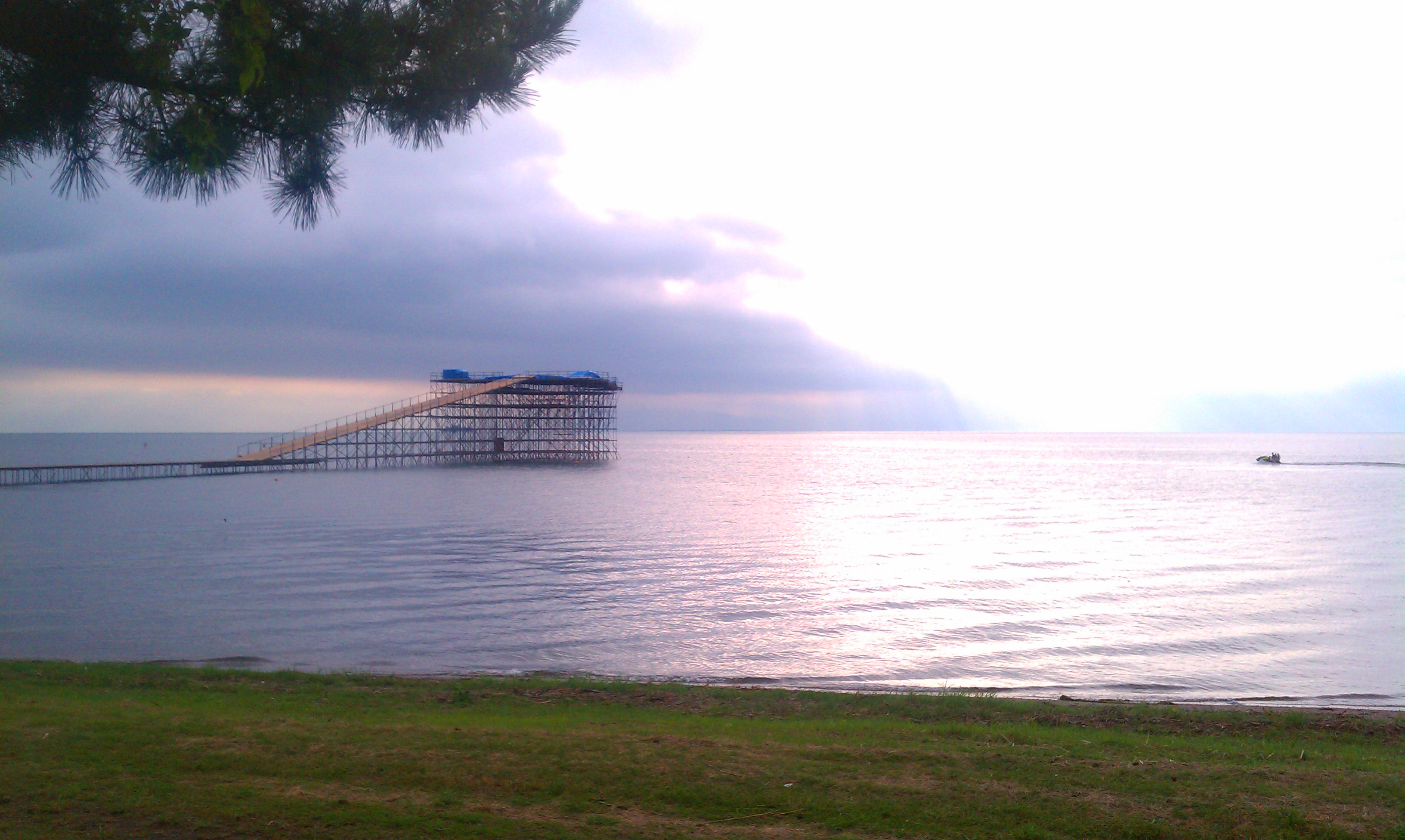 松原